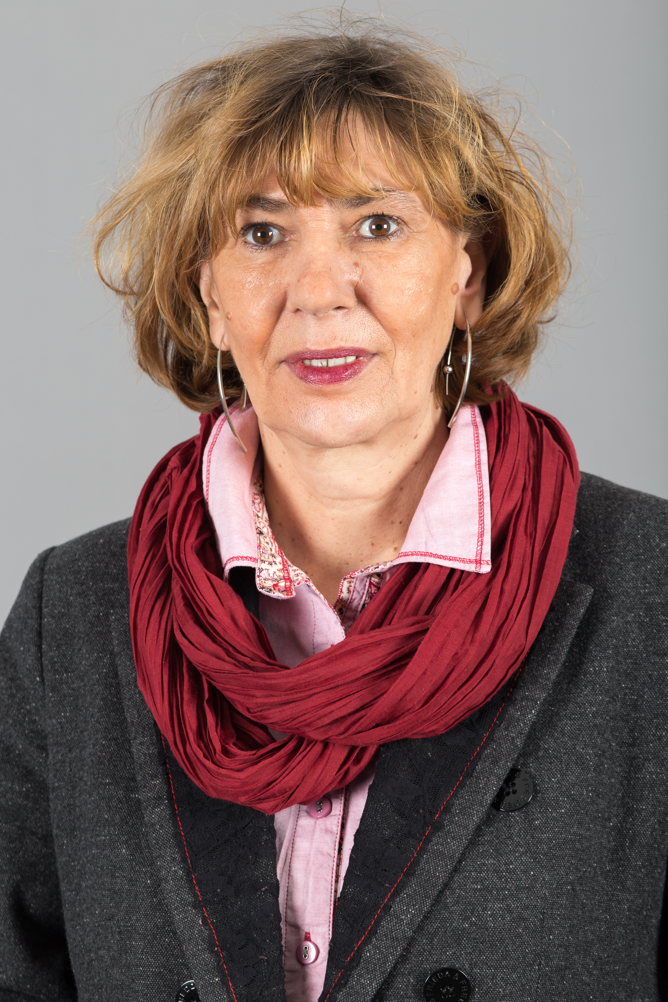 Ute Lukasch